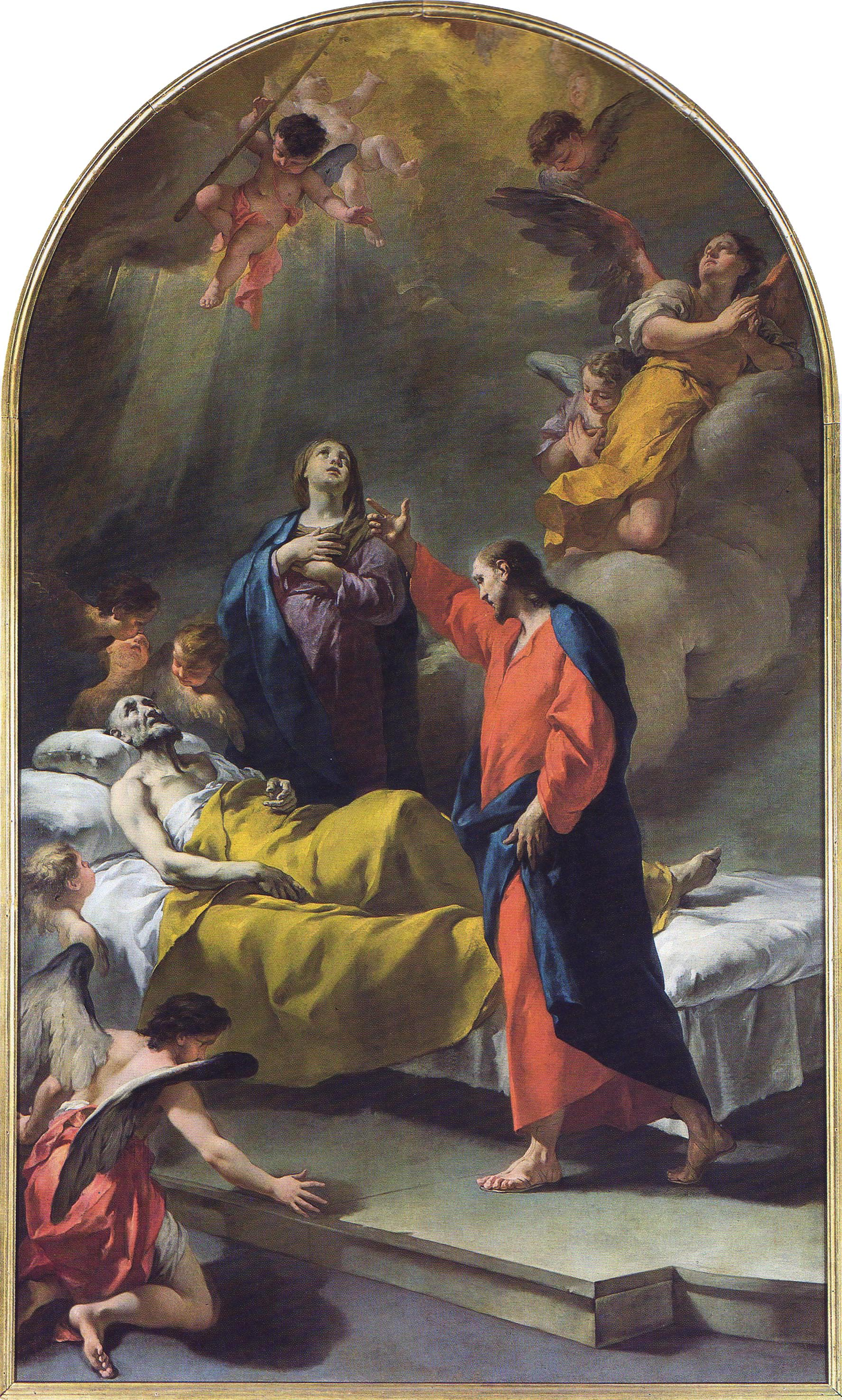 Morte di san giuseppeDeath of Saint Josephlabel QS:Lit,"Morte di san giuseppe"label QS:Len,"Death of Saint Joseph"